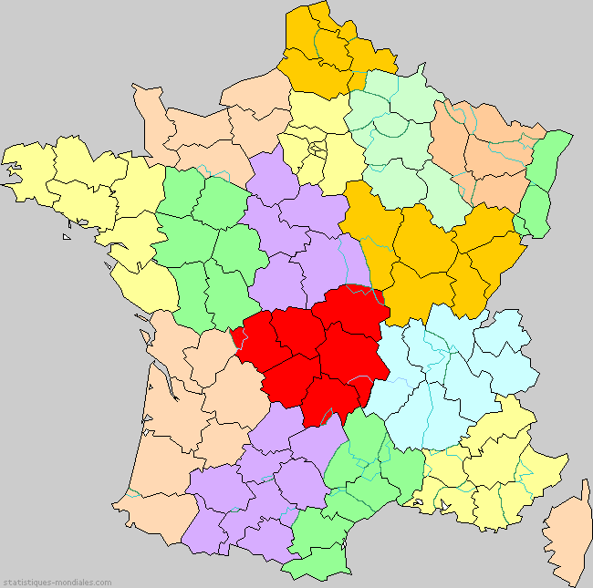 France - Proposition de découpage régional Gravier - 1947 - Source : J.M. Miossec, Géohistoire de la régionalisation en France : L’horizon régional, Quadrige/PUF, 2008